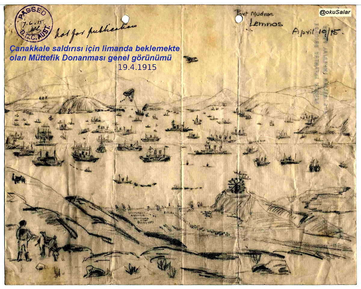 Çanakkale, Gelibolu, Anzak, Mondros Limanı